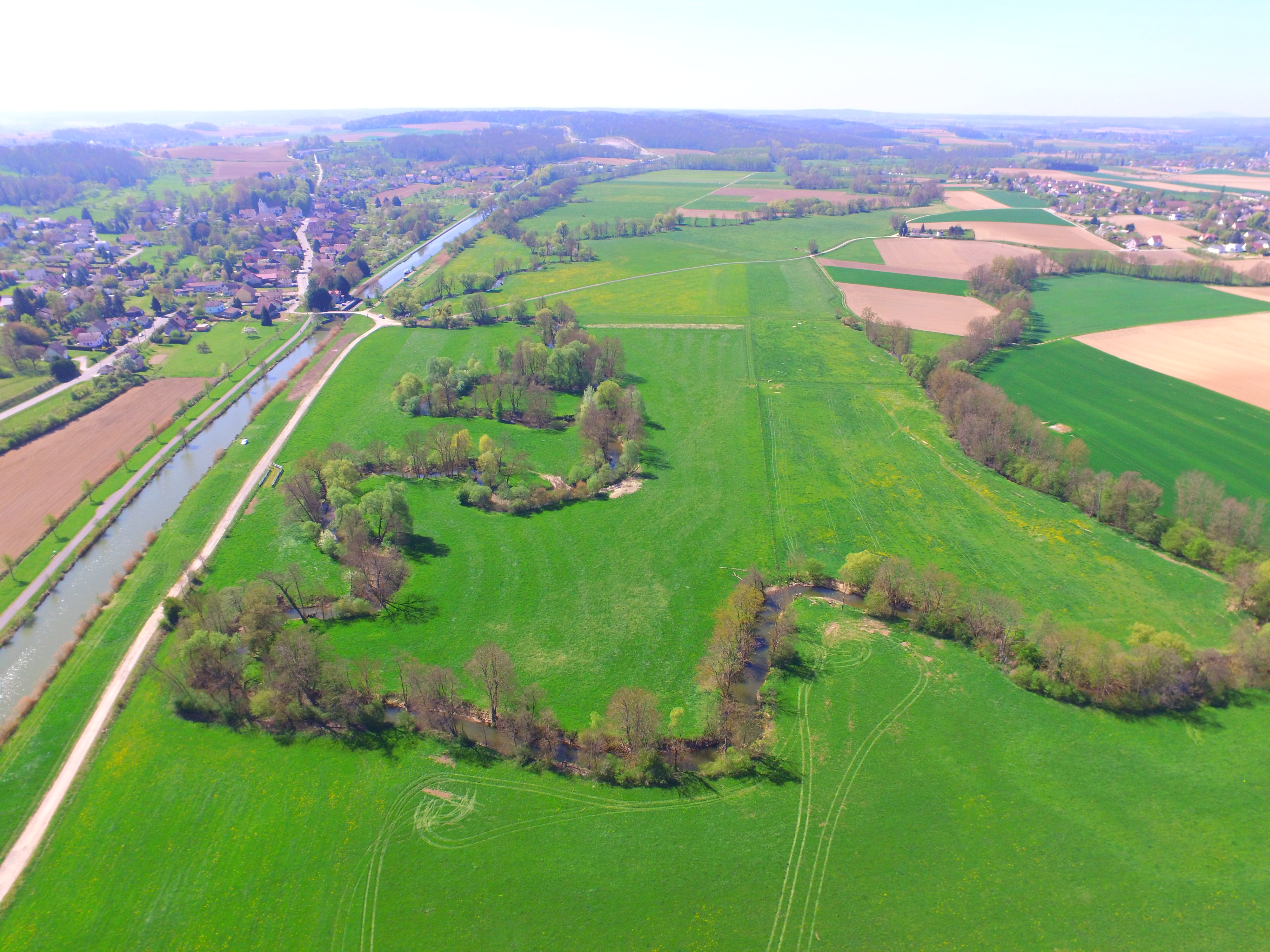 Méandres de la Largue, dans son fond de vallée inondable, occupé de prairies. A gauche le canal du Rhône au Rhin et Heidwiller, à droite le Spechbach (affluent) et la commune de Spechbach.